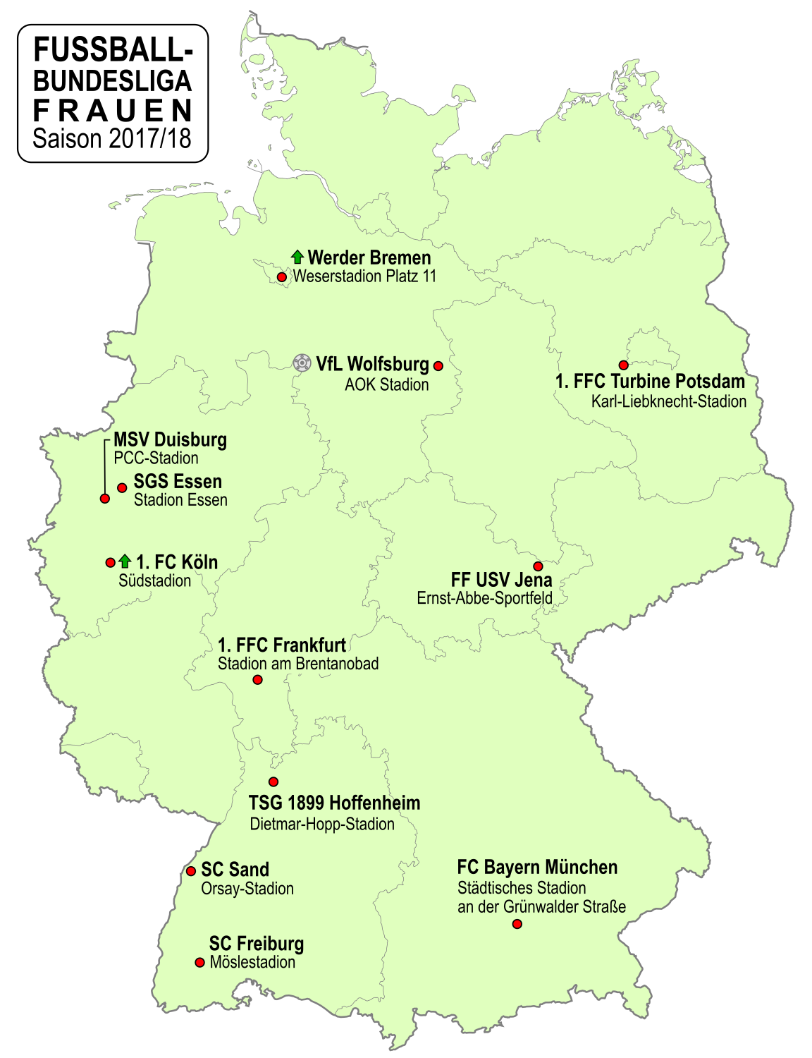 Karte der Vereine der Frauen Fußball-Bundesliga-Saison 2017/2018